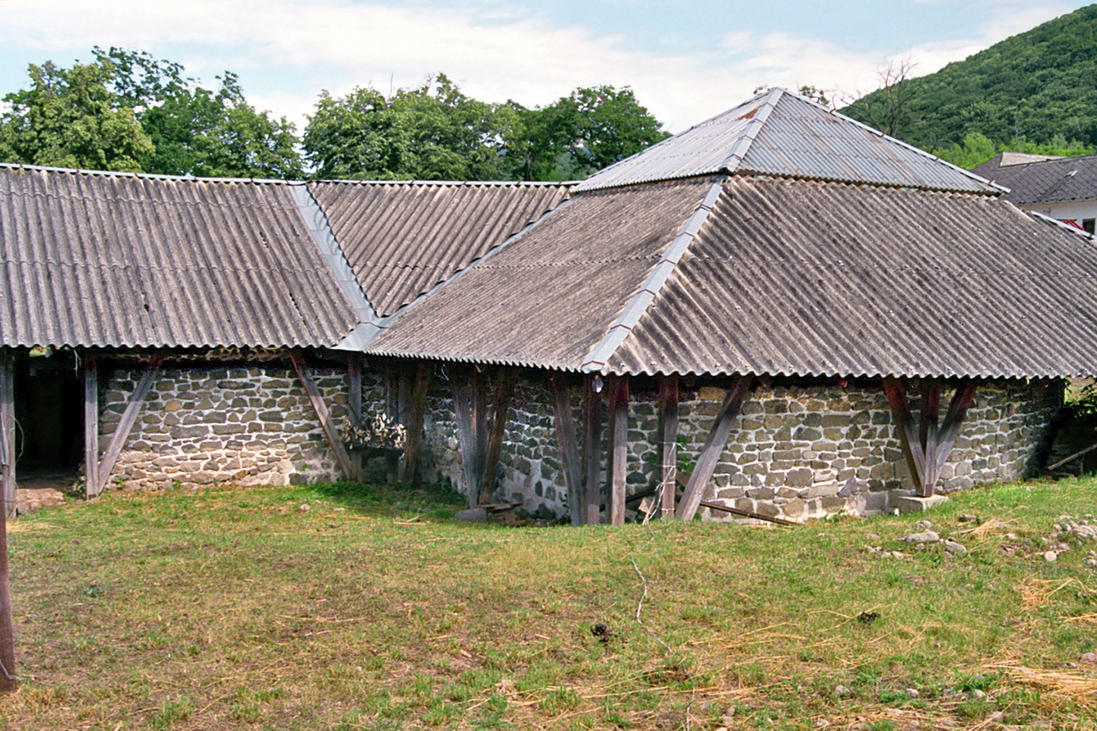 Kastell Visegrád–Gizellamajor (Ungarn): Südwestecke (Zustand 2012).